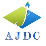 Logo de l'association joudour pour le développement et de citoyenneté a khémisset Maroc